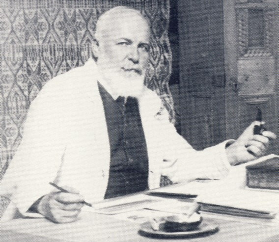 Arkitekt Gustaf Ankarcrona (1869-1933)